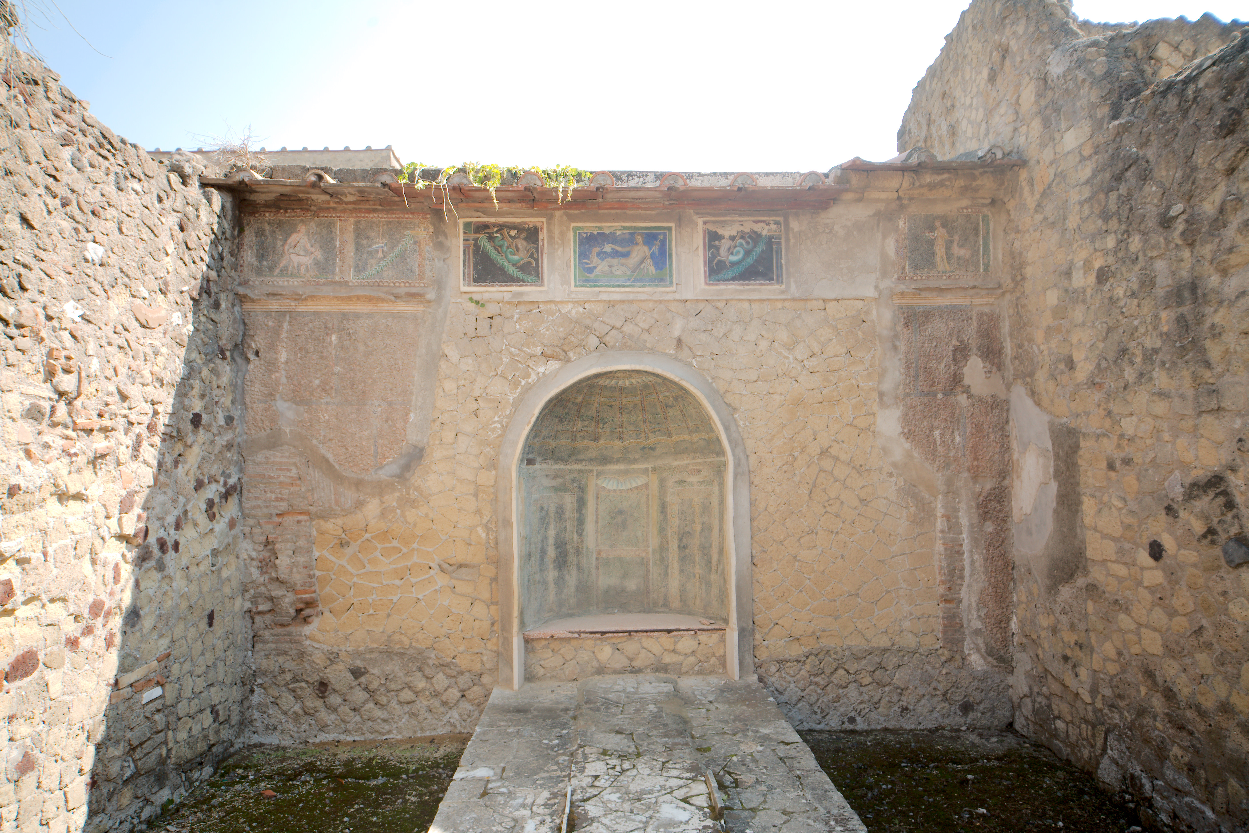 Casa dello Scheletro Herculaneum